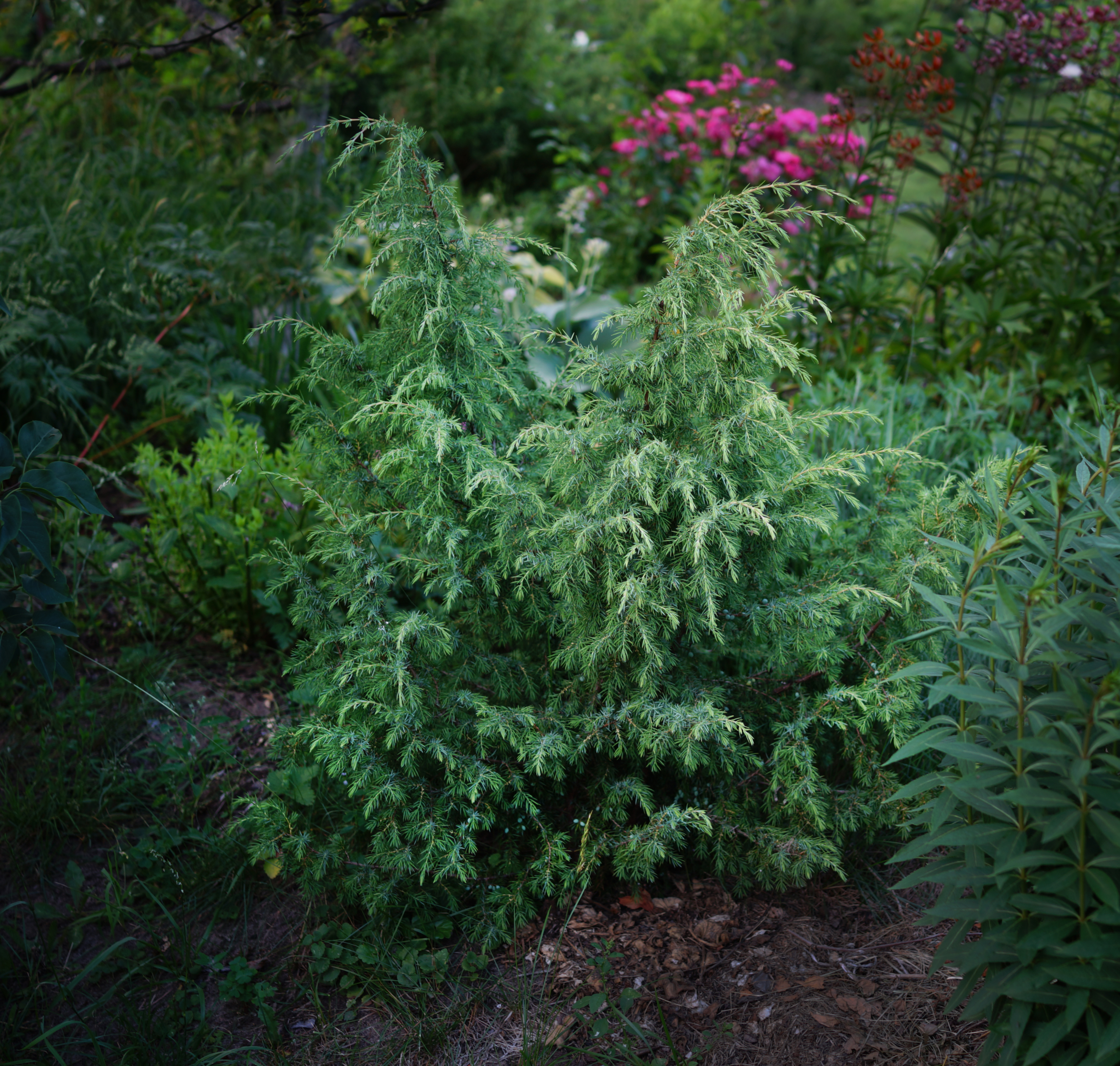 Россия. Владимирская область. Частный сад.